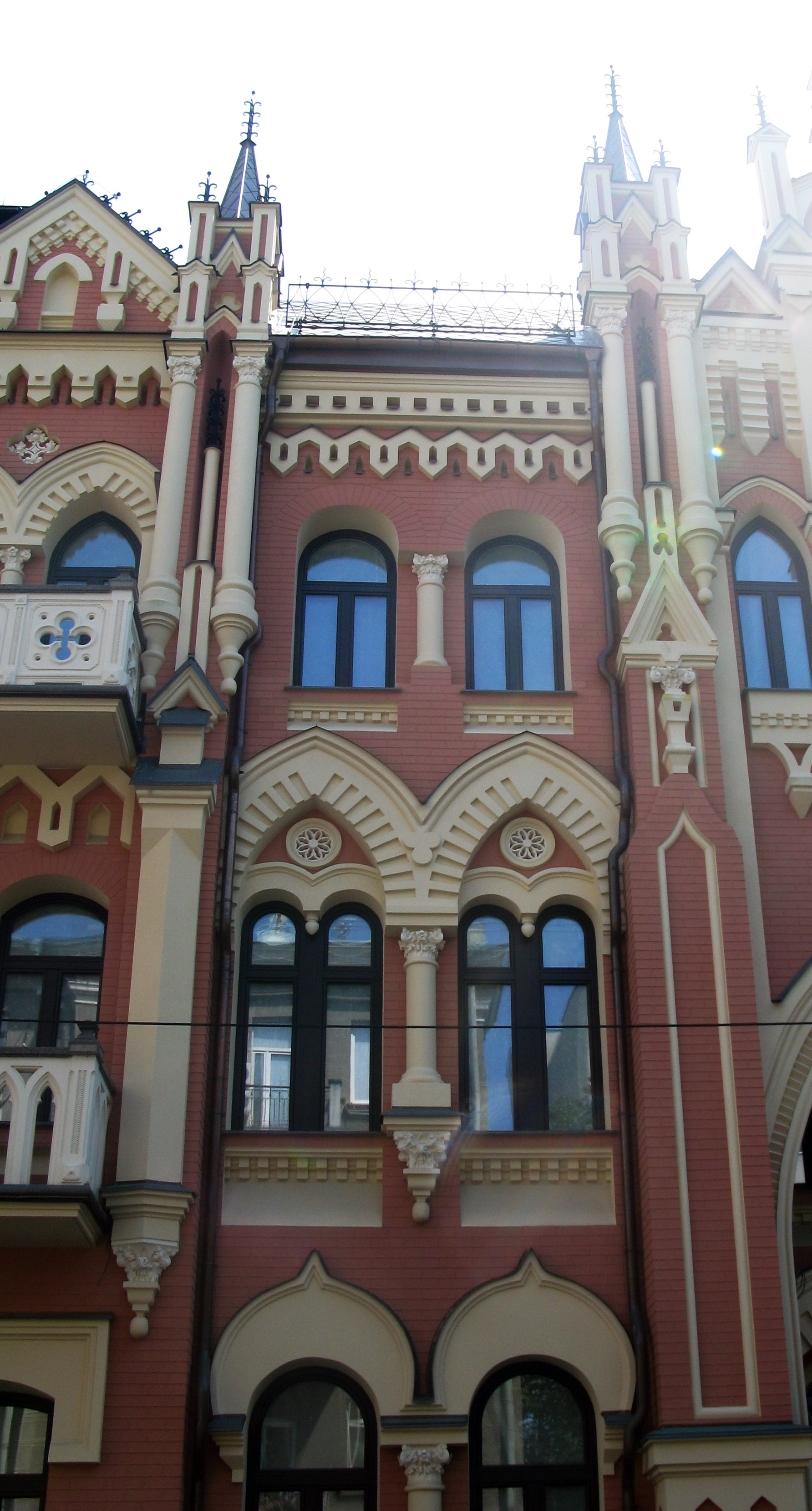 Будинок прибутковий, Київ, Шовковична вул., 19